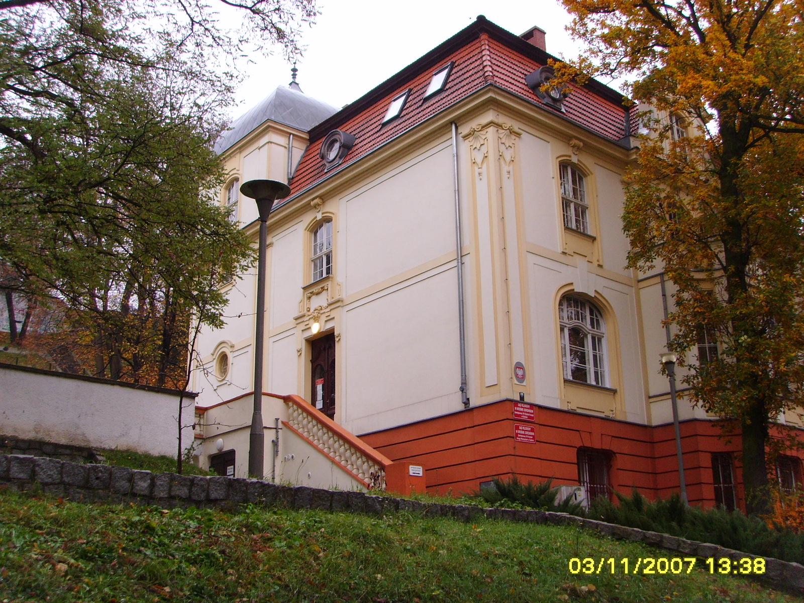 Gubin, ul. Piastowska 16 - budynek Sądu Grodzkiego, wcześniej Dom Zołnierza i muzeum